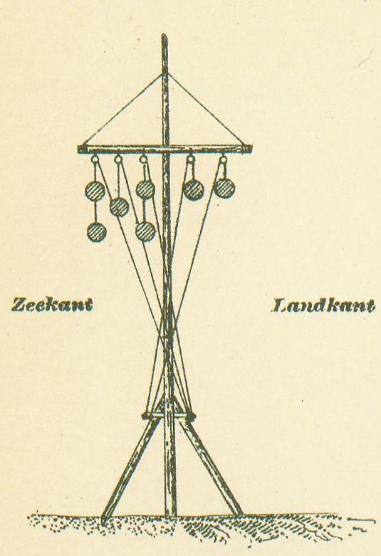 Schets van de Hollandse Kusttelegraaf tijdens de Bataafse Republiek.